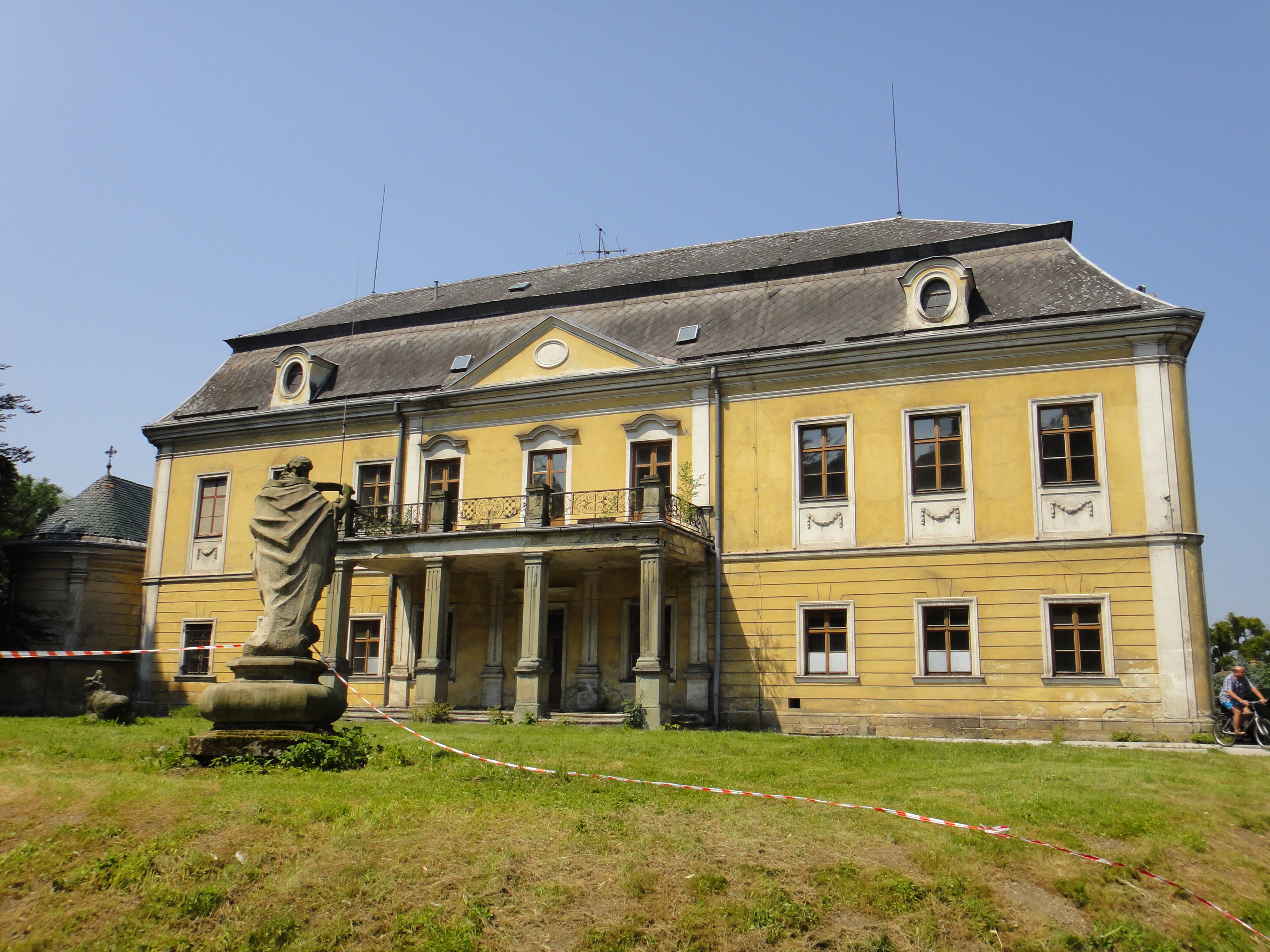 Zámek Paskov, Paskov 1, Paskov.